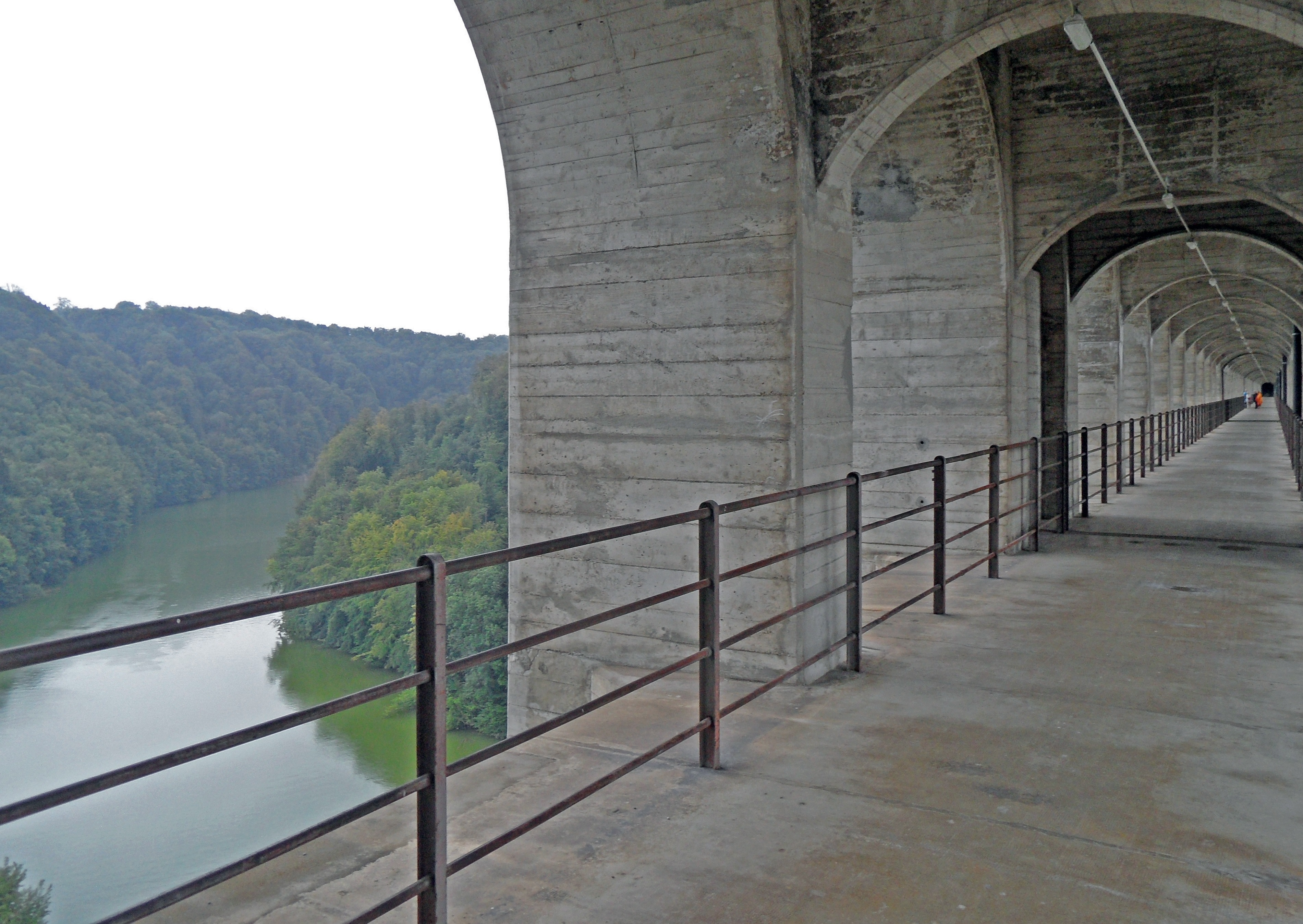 Grandfeybrücke Fribourg